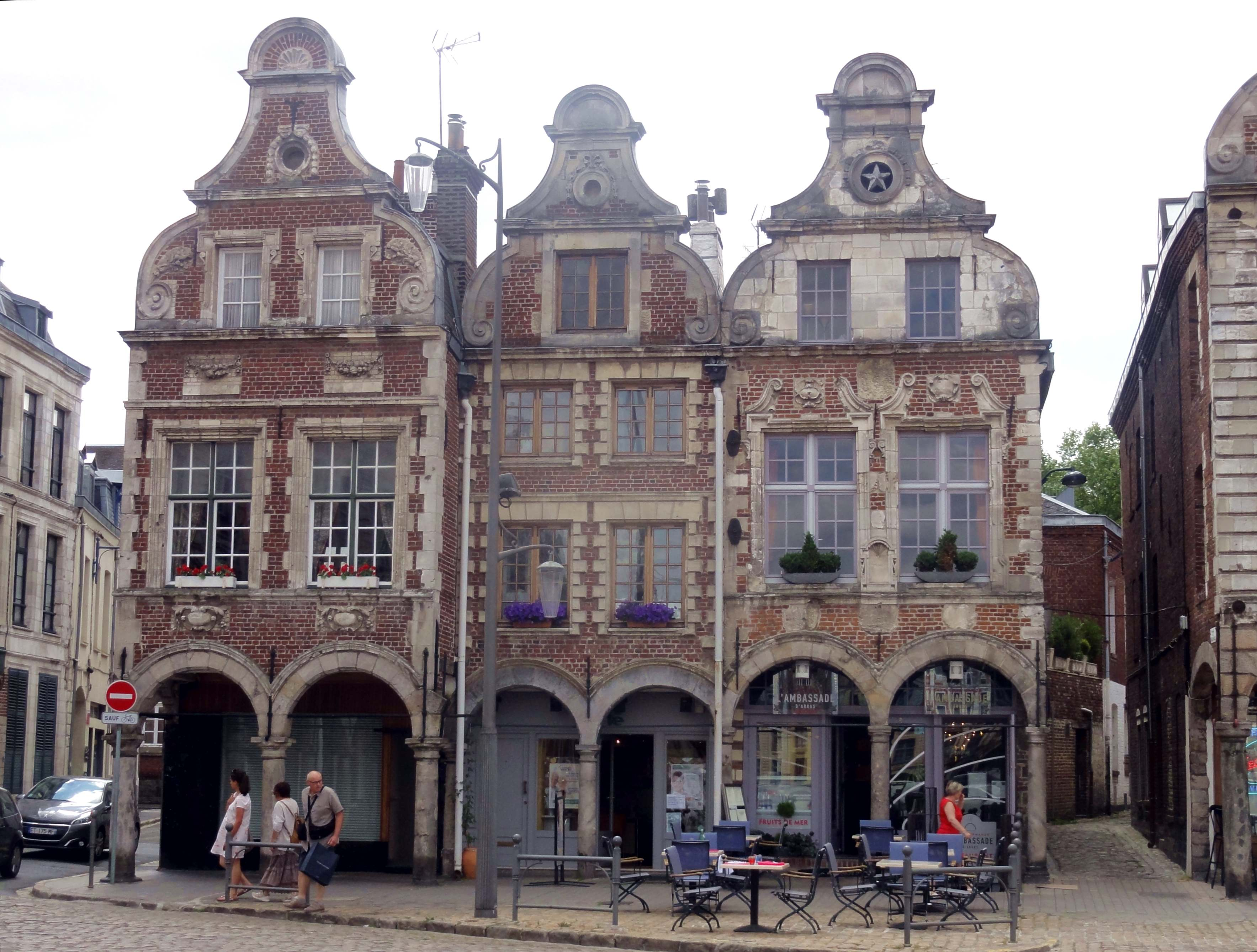 La Grand'Place d'Arras.